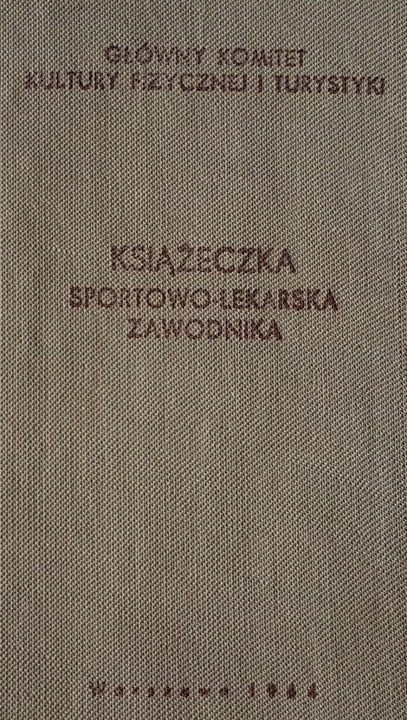 Książeczka sportowo-lekarska zawodnika